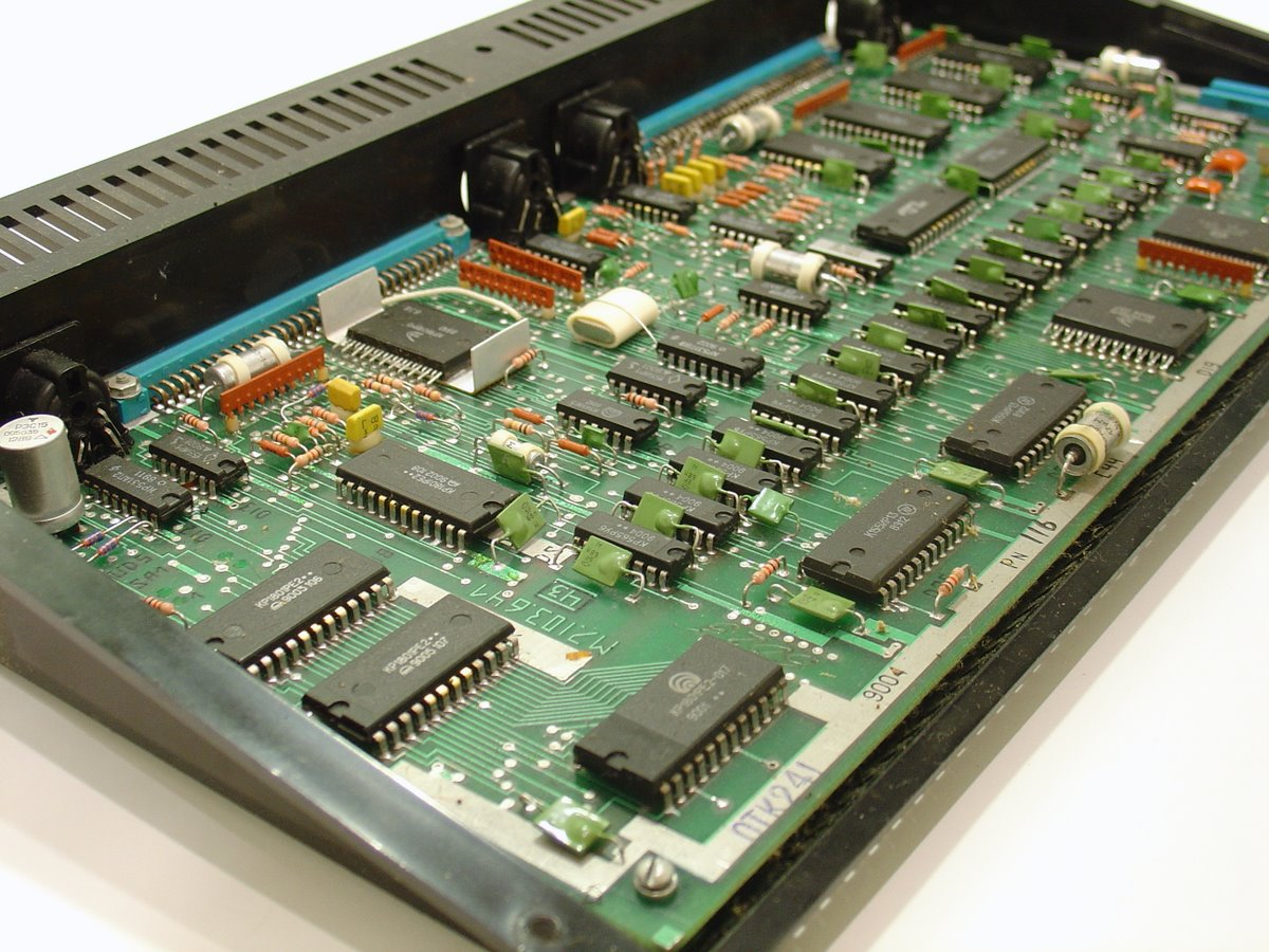 BK0010-01 System Board, side view